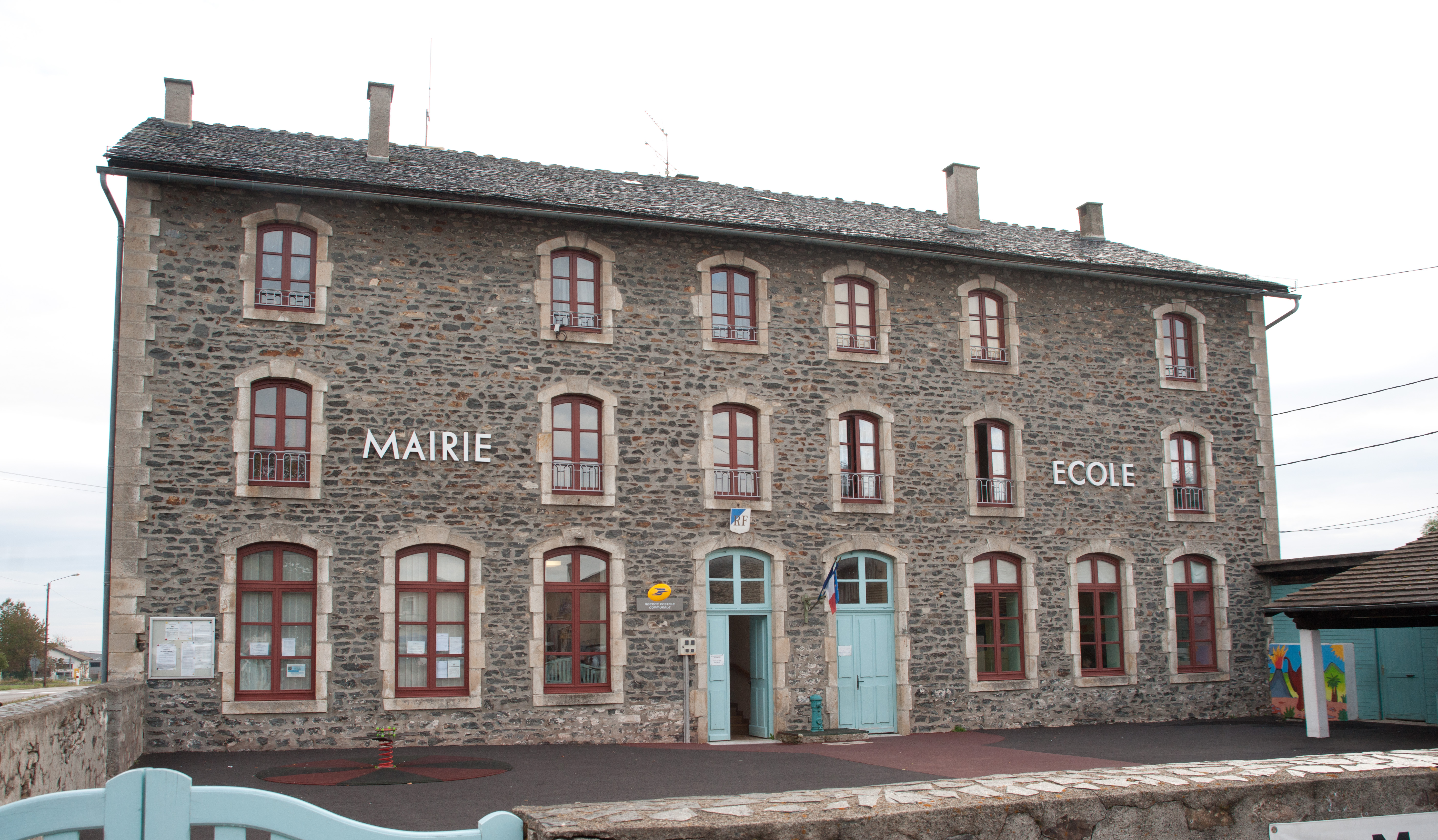 Mairie de la commune du Pertuis, Haute-Loire, France.